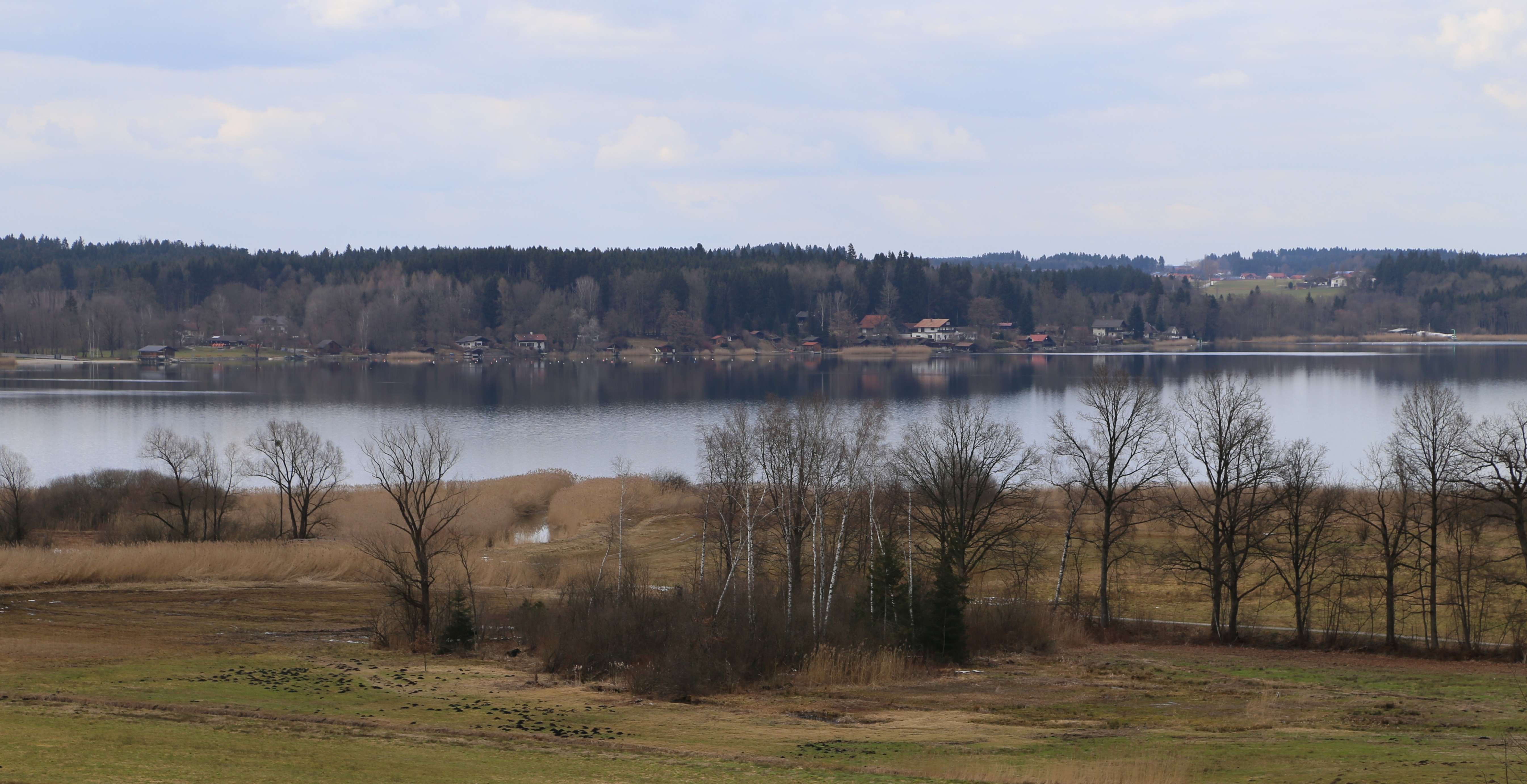 Südufer Simssee, Nähe Ecking